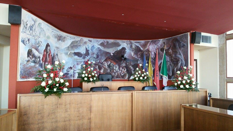 La Sala consigliare del Comune di Piana degli Albanesi, presso il nuovo municipio. Le pitture rappresentano la strage di Portella della Ginestra. Le bandiere esposte sono: Unione Europea, Regione Sicilia, Repubblica d'Albania, Repubblica d'Italia.